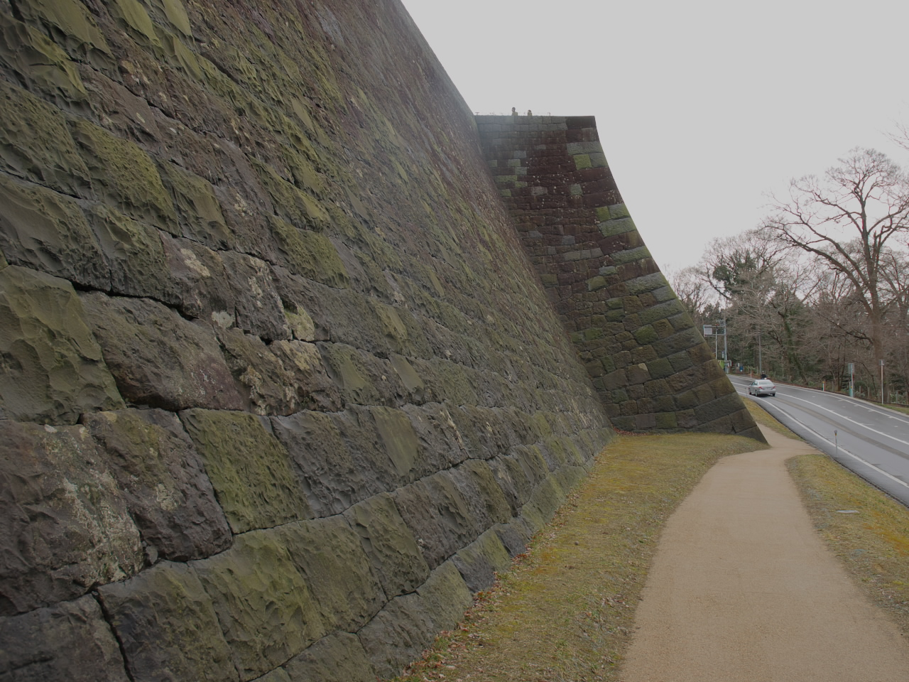 仙台城址の天守台の下から石垣を撮影。石垣が出っ張っている部分は道を見下ろす見張り台か? その上に観光客が見える。 [MAP by ALPSLAB]